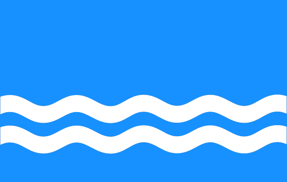 Hiiumaa valla ja varasema Hiiu valla lipp